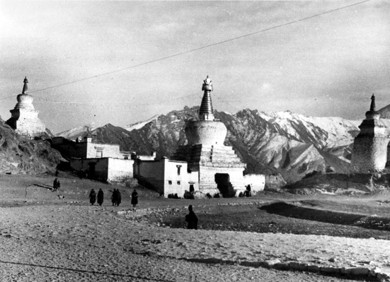 Lhasa, Eingangstschorten